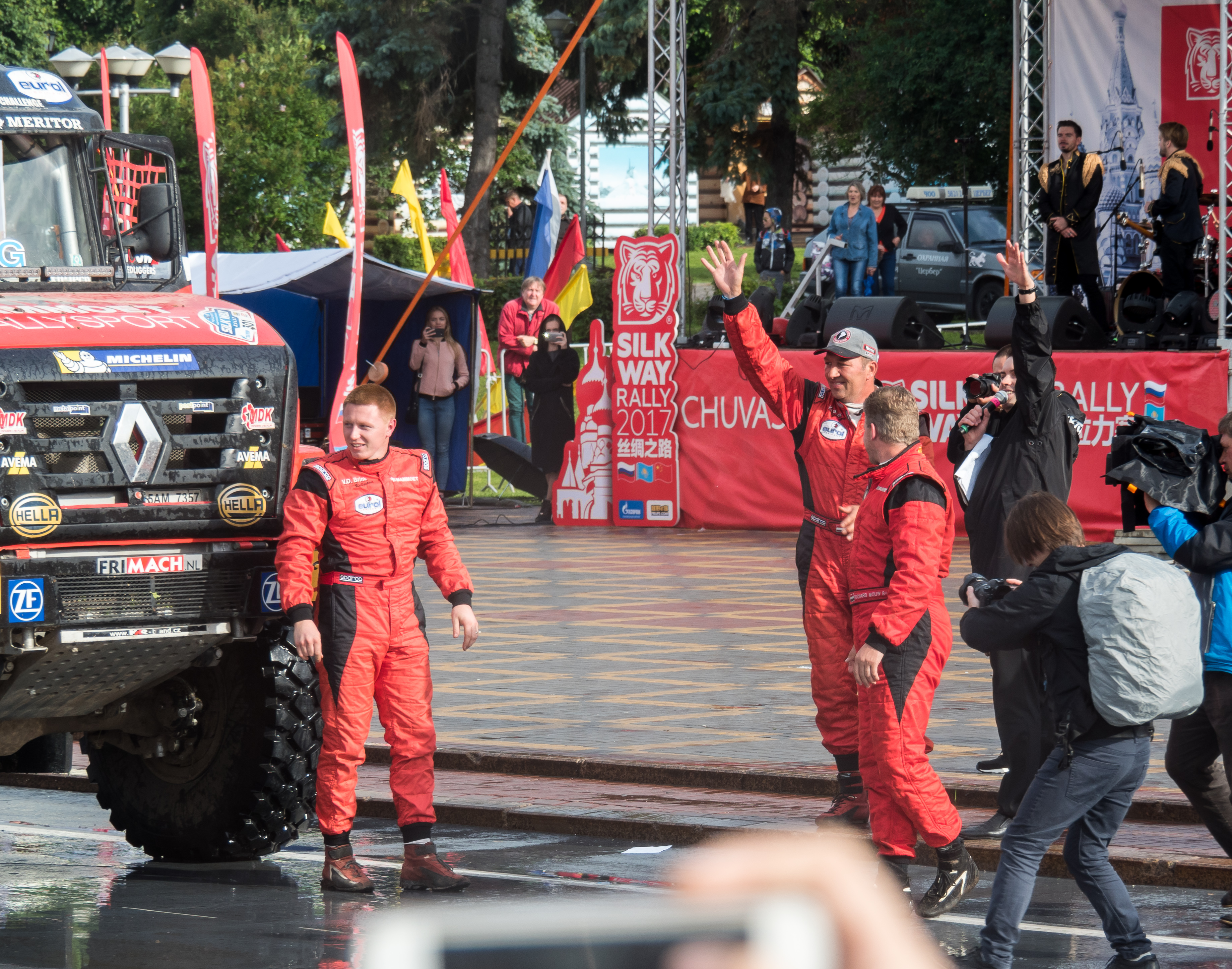 Команда экипажа №301. Ралли "Шёлковый путь 2017". Чебоксары